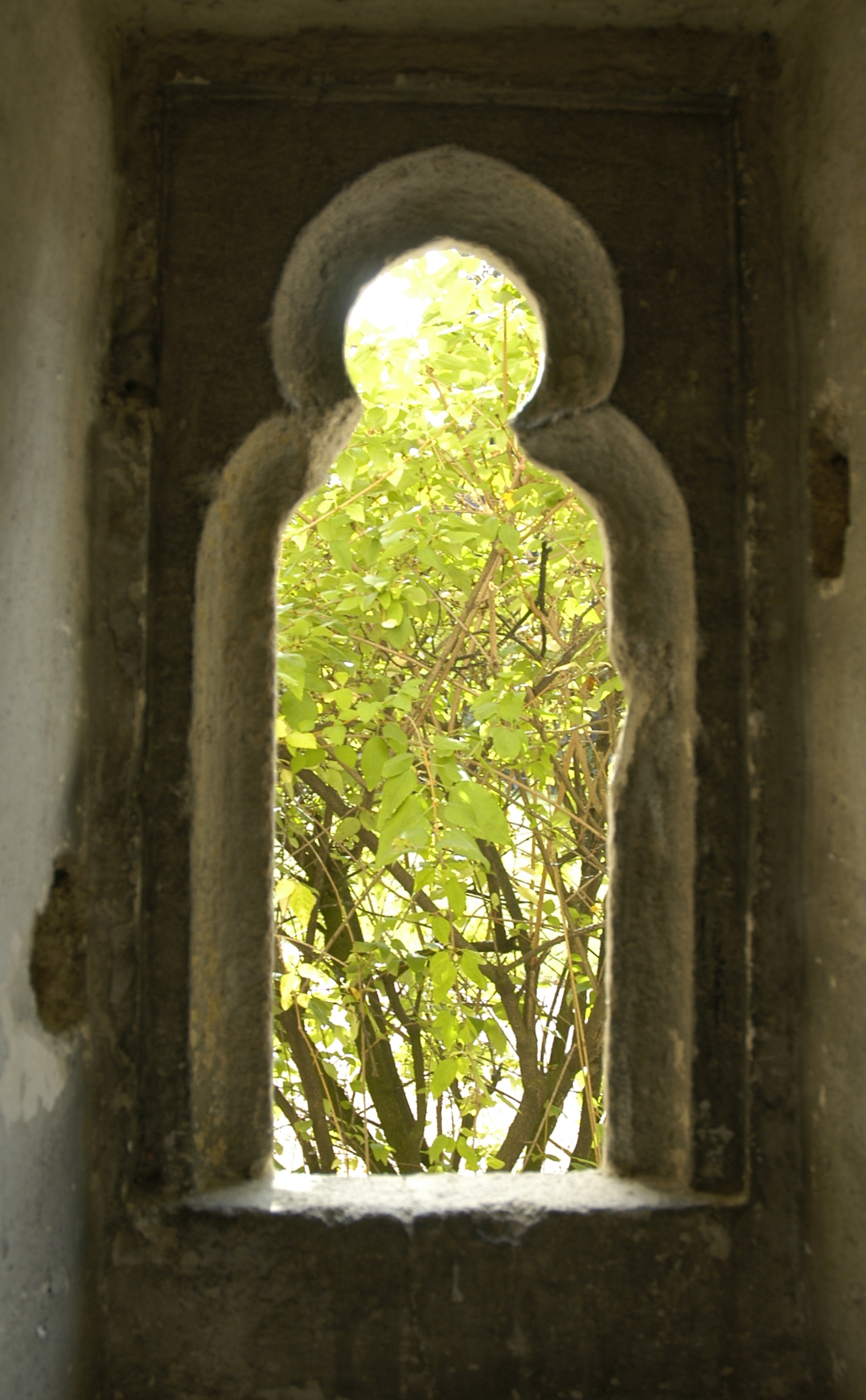 Schrattenthal - Dreipaßluke im Treppentürmchen der Schlosskapelle Dieses Bild wurde anlässlich des österreichischen Tags des Denkmals 2012 in Niederösterreich eingereicht.